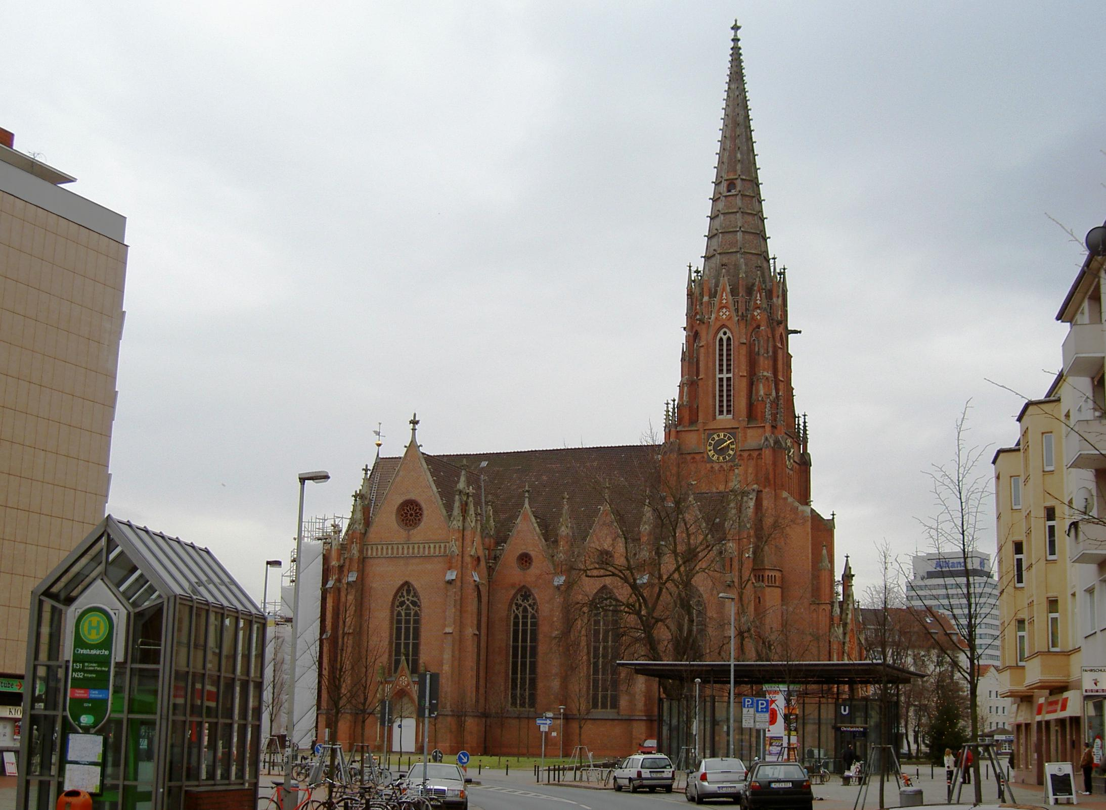 Blick von Norden auf die Christuskirche in Hannover-Nordstadt